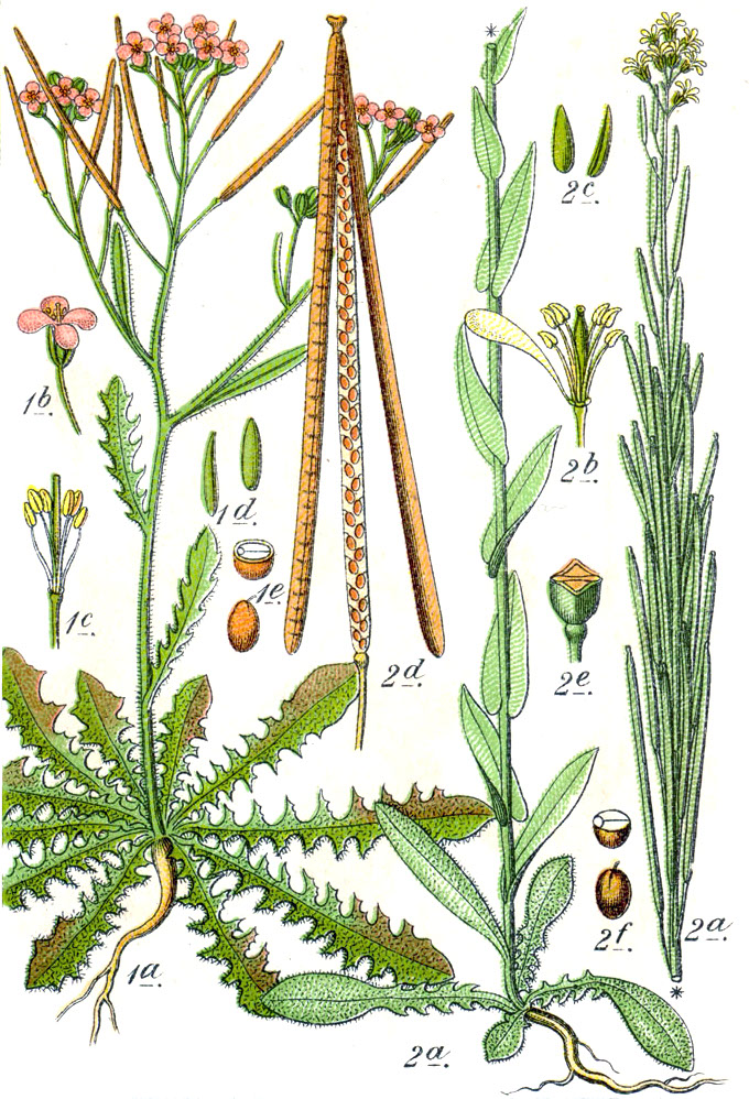 1. Arabidopsis arenosa (L.) Lawalrée, syn. Cardaminopsis arenosa subsp. arenosa, Crucifera arenosa E.H.L.Krause 2. Turritis glabra L., syn. Arabis glabra (L.) Bernh., Crucifera turritis E.H.L.Krause Original Caption 1. Gänsekresse, Crucifera arenosa 2. Echtes Turmkraut, C. turritis